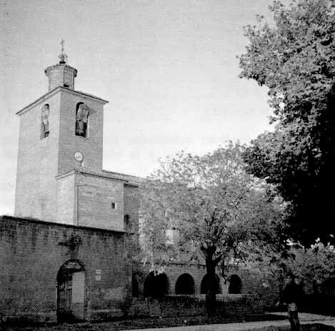 Foto antigua de la iglesia del pueblo